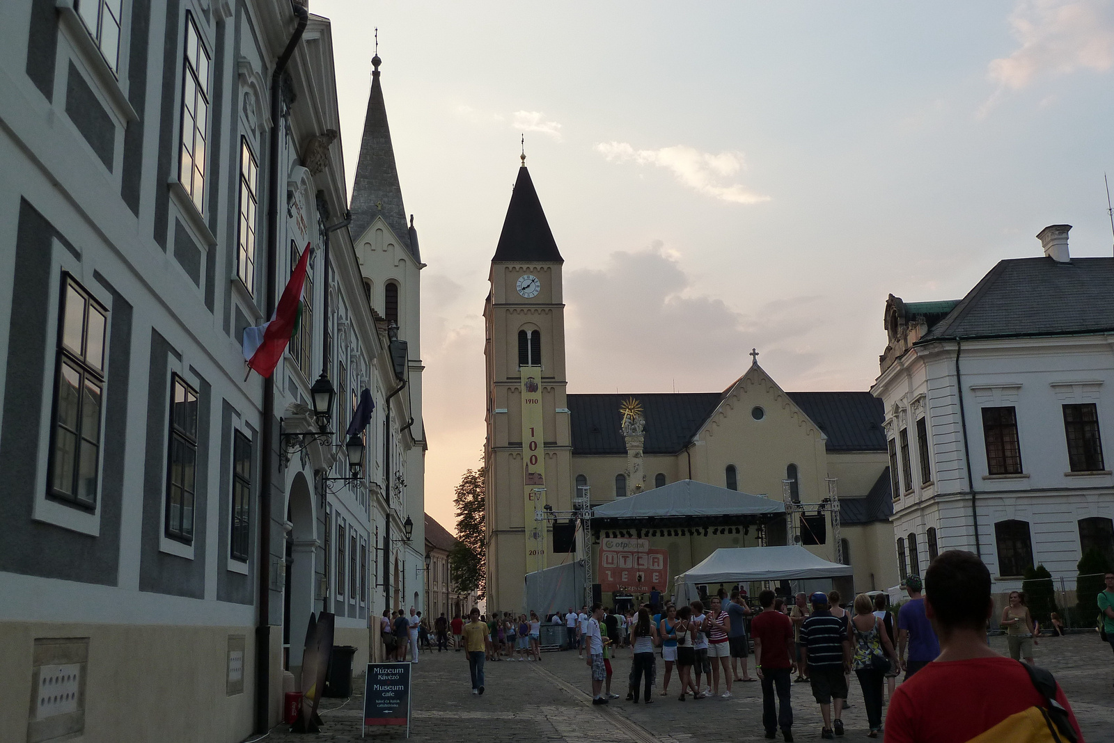 Székesegyház (Veszprém, Vár u.) This is a photo of a monument in Hungary. Identifier: 10682